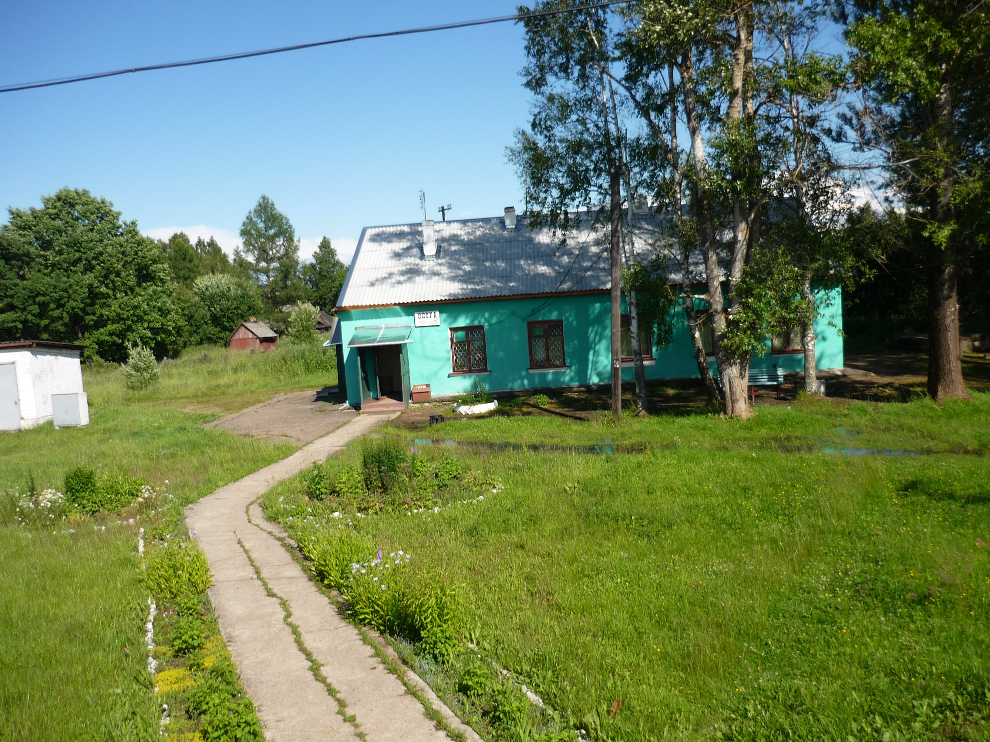 Станция Осуга